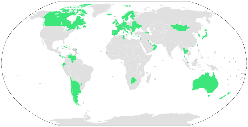 El mapa muestra para el año 2014 los países en el mundo que aplican la asistencia sanitaria universal en sus ciudadanos y constituciones.